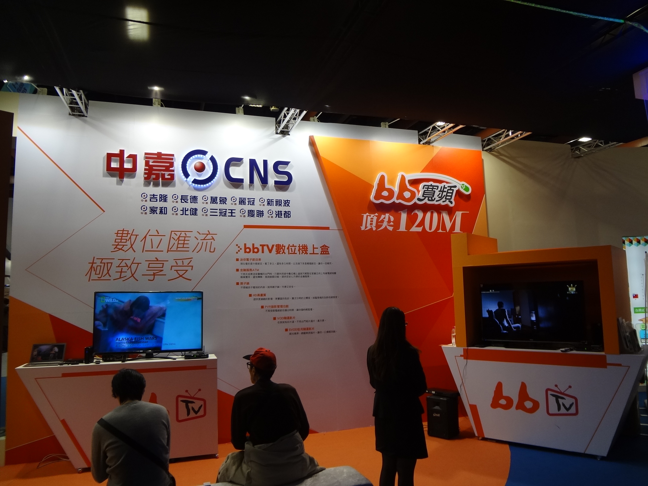 2013年資訊月的中嘉網路攤位。